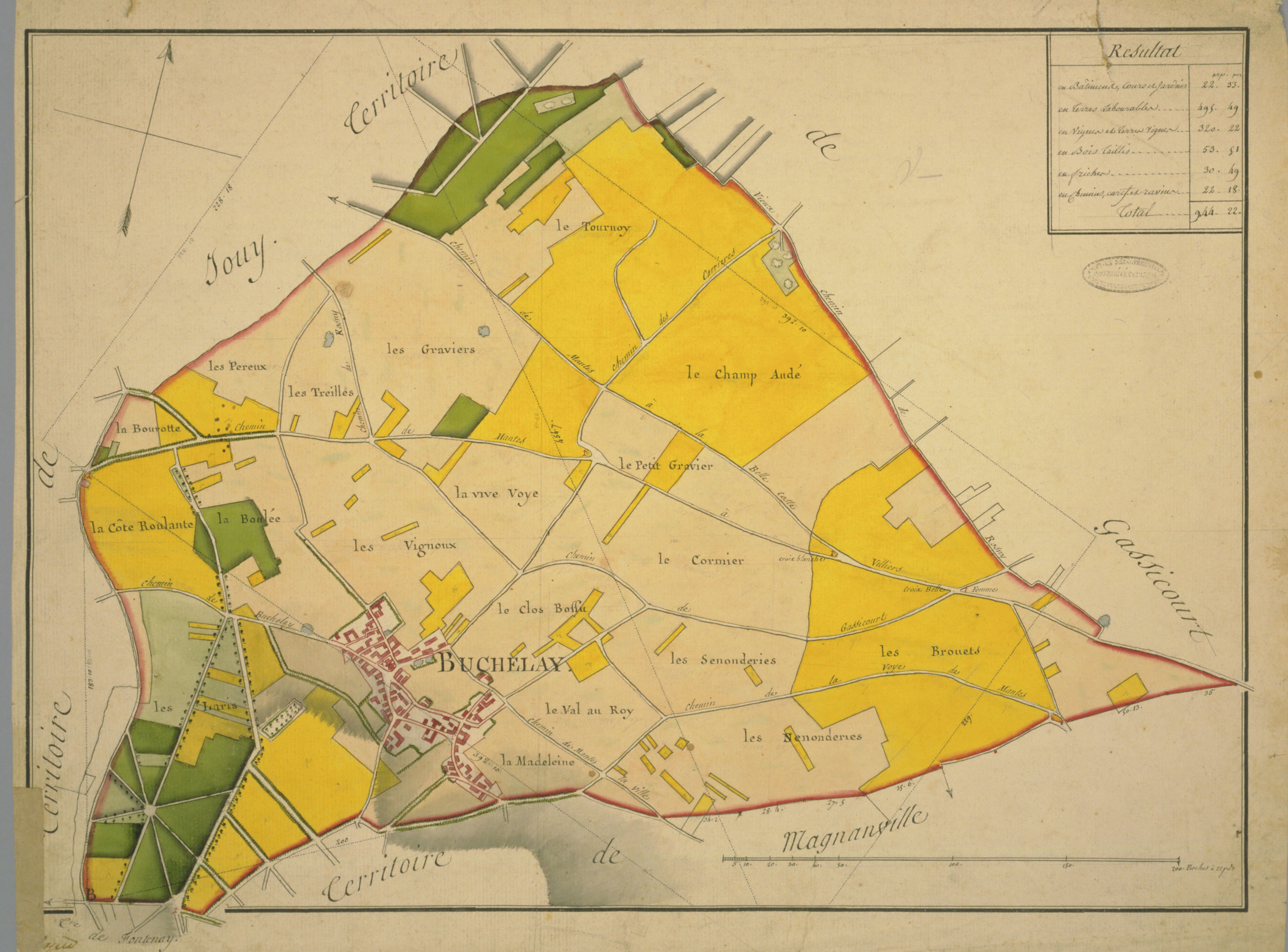 Plan d'intendance de la paroisse de Buchelay (Yvelines - France) en 1776.